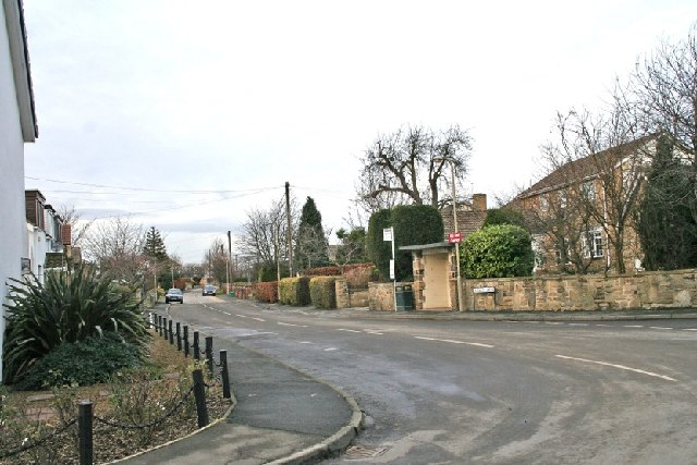 Burton Salmon